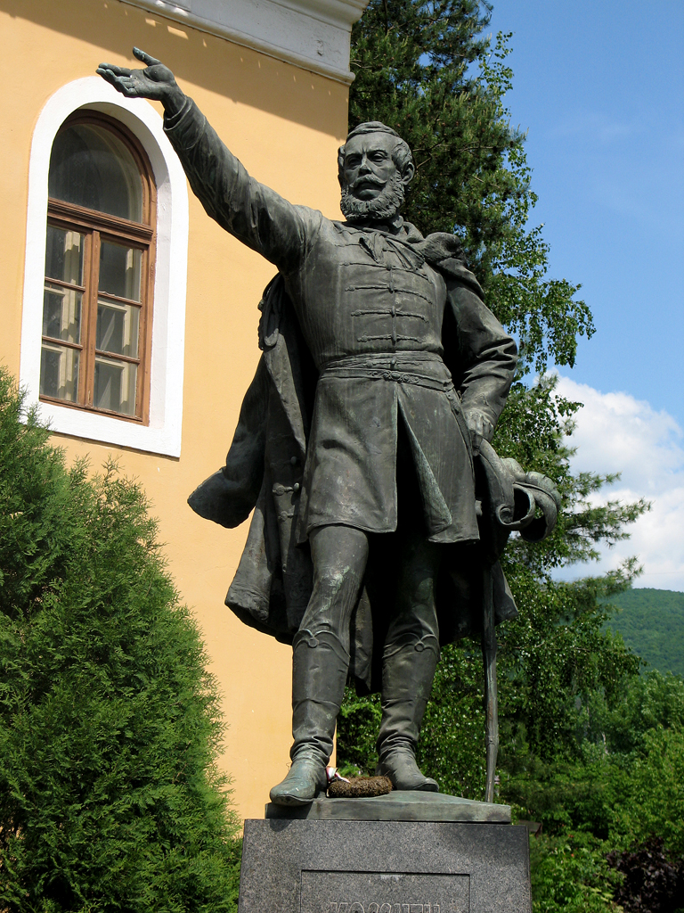 Bronzová plastika v Rožňave